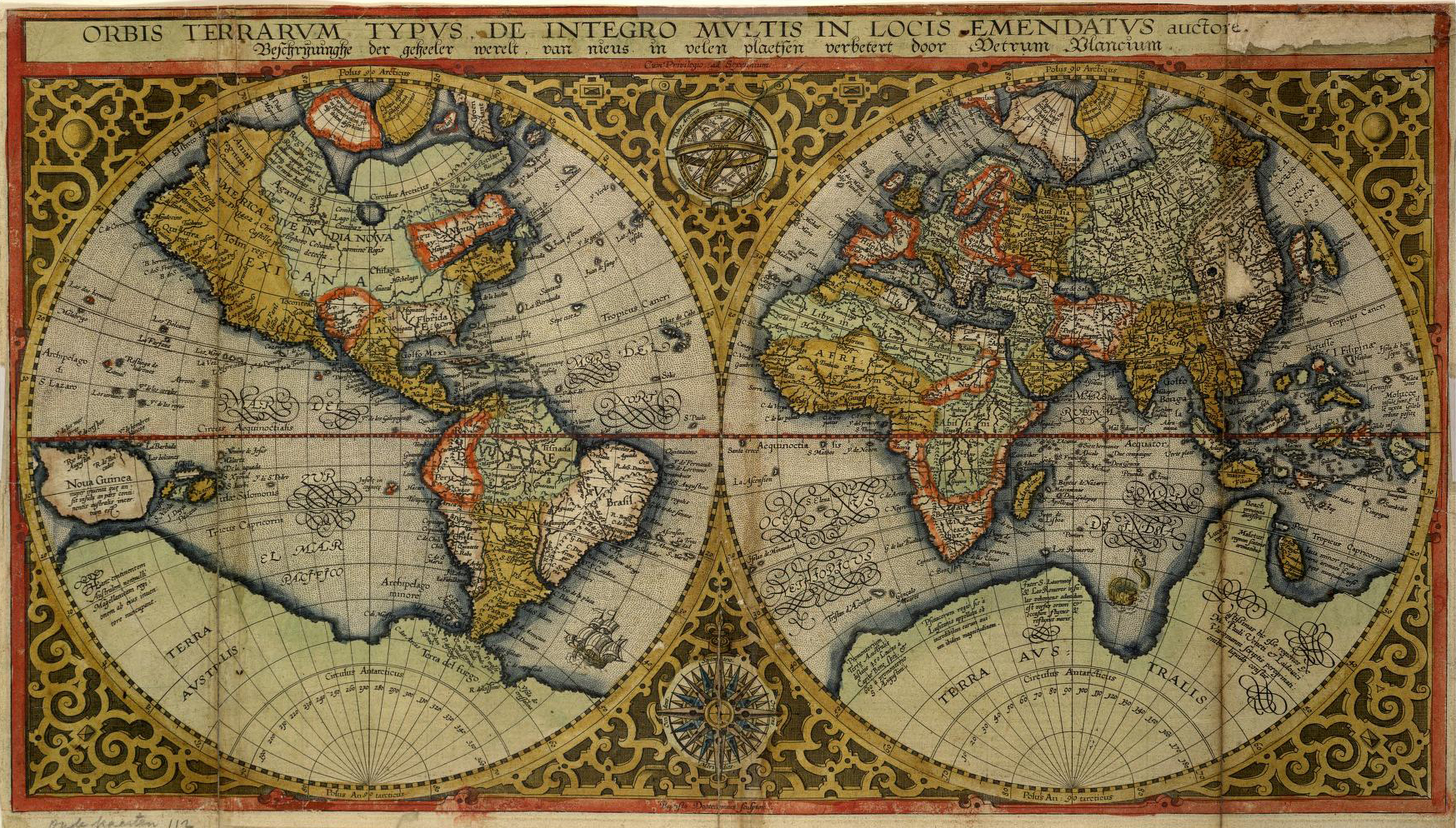 title=Orbis terrarum typus : de integro multis in locis emendatus; size=29x51 cm; De oudste wereldkaart door Petrus Plancius, afkomstig uit de Bijbel uitgegeven door Laurens Jacobs